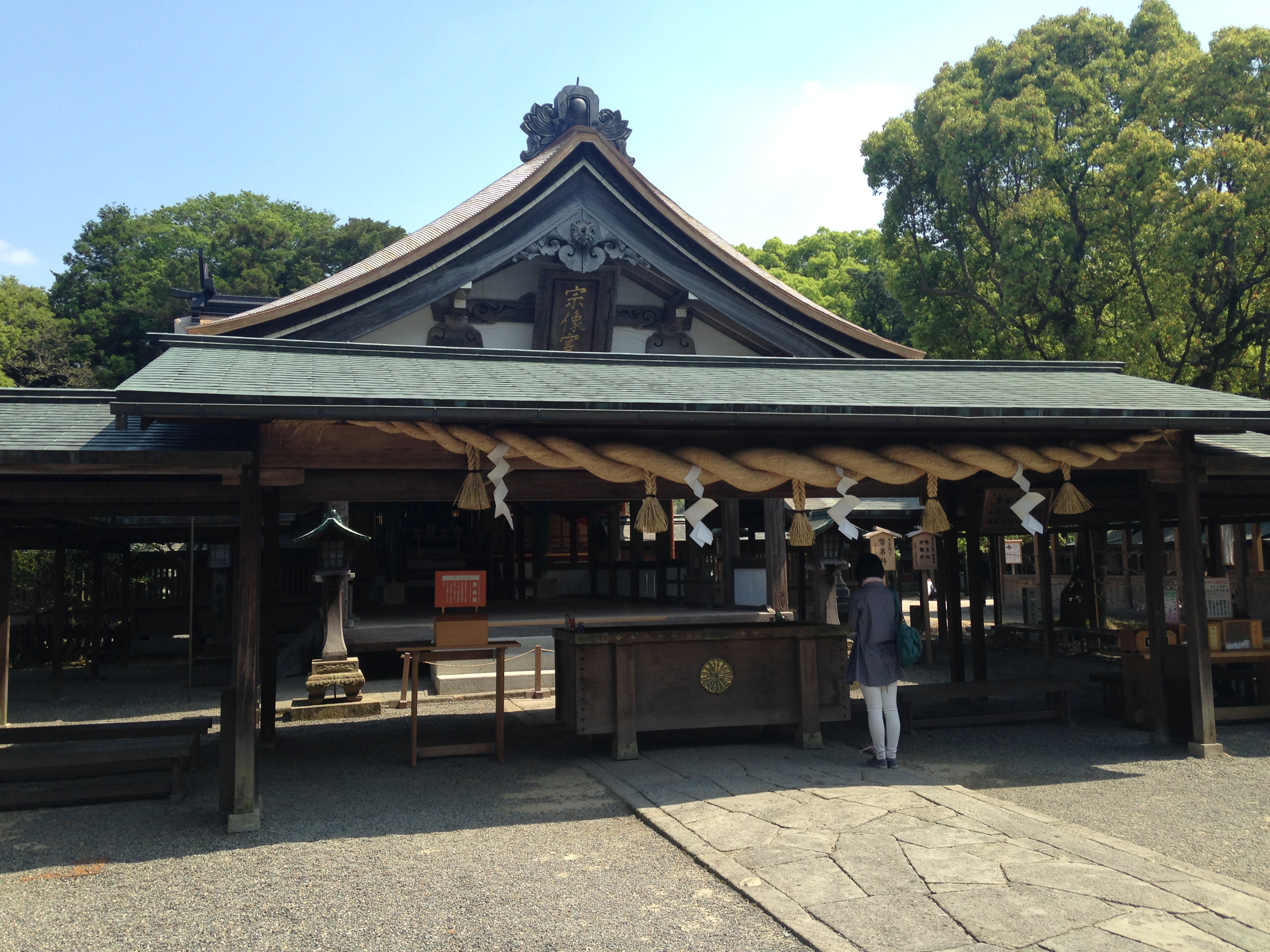 宗像大社(辺津宮)の拝殿